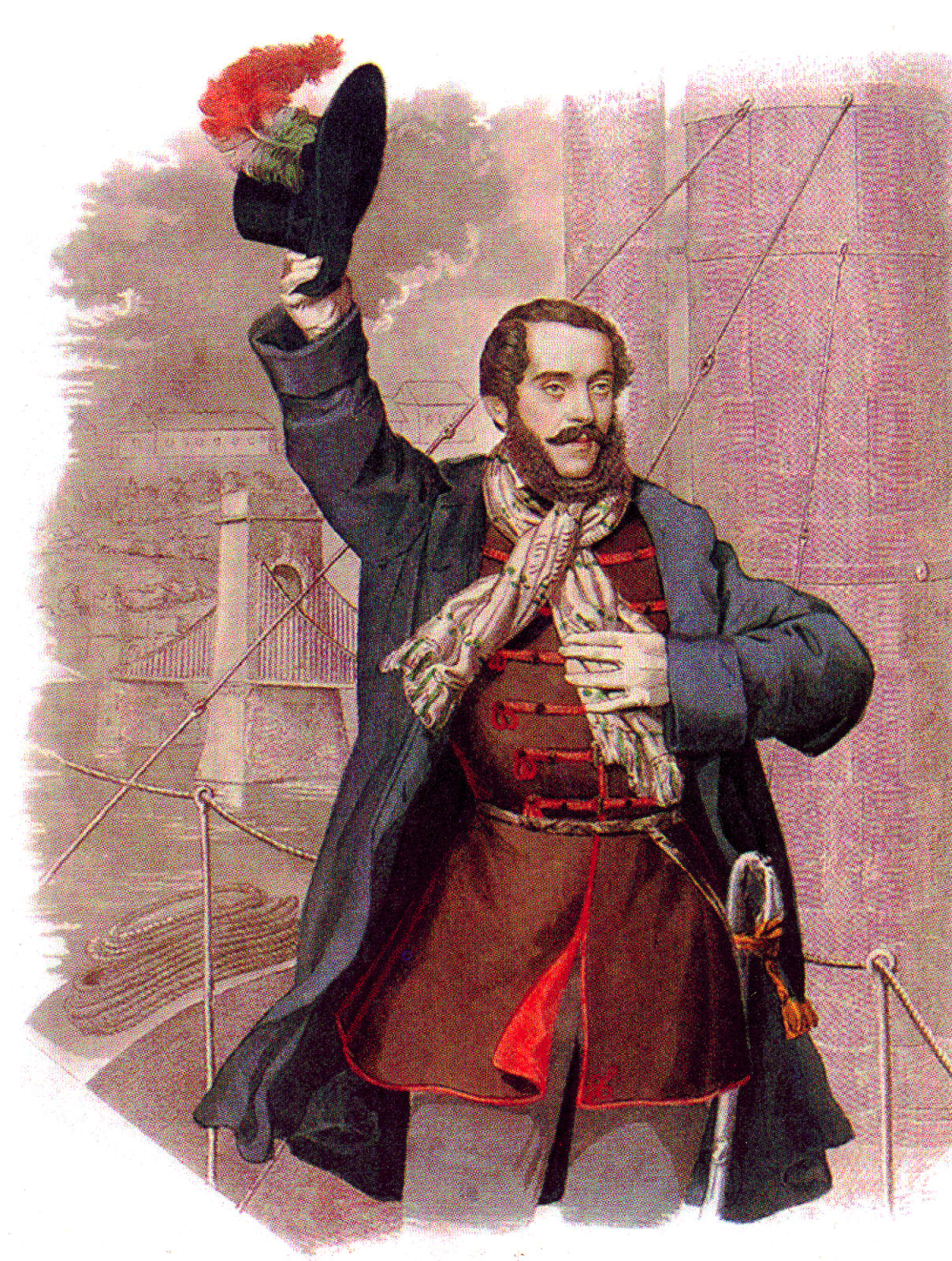 Kossuth Lajos megérkezése Pest-Budára a pozsonyi országgyűlésről 1848. április 14-én (Tyroler József színezett rézmetszete)